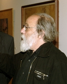 José Rodrigues, Portuguese sculptor, at Exponor